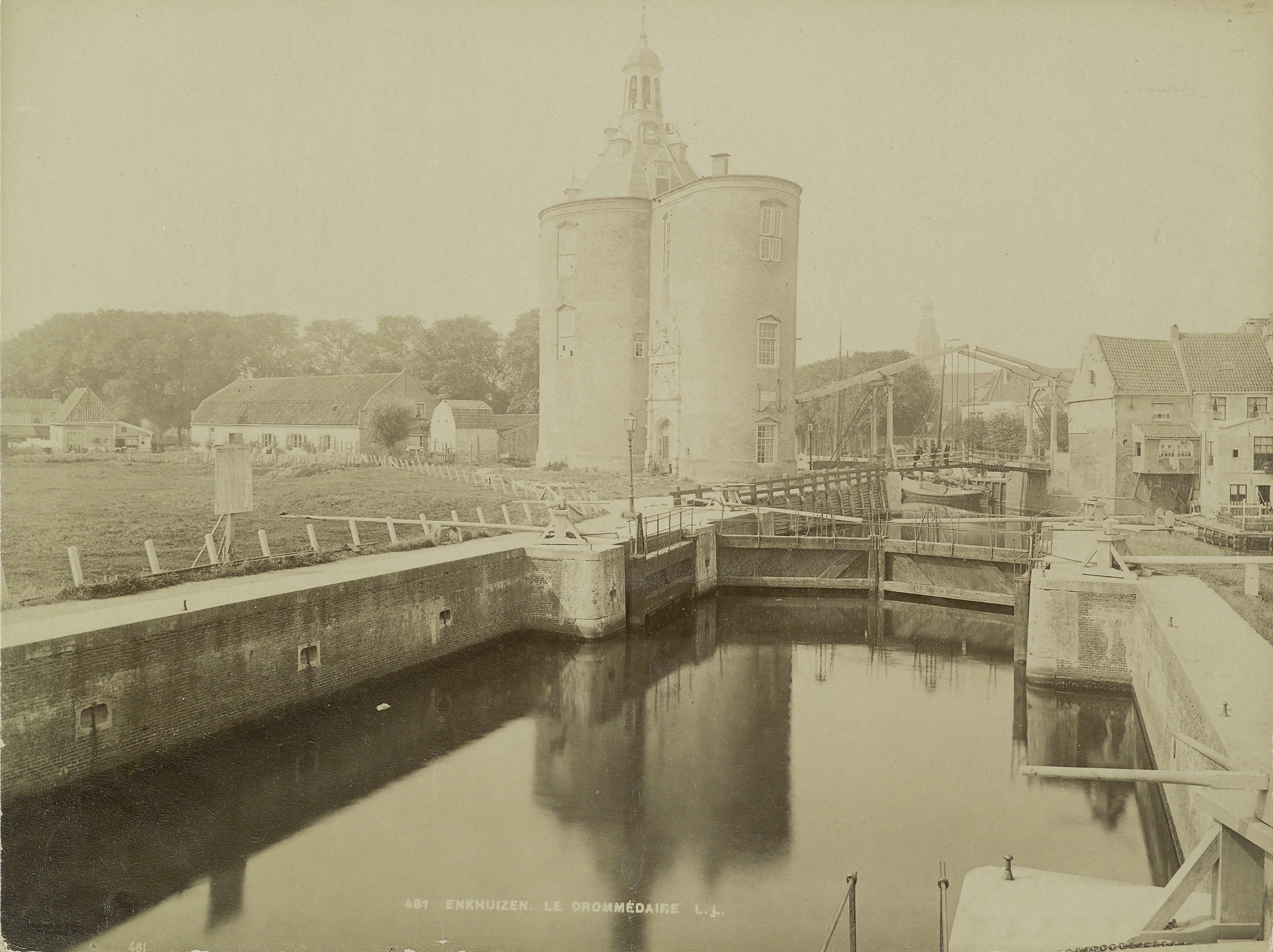 Drommedaris: Verdedigingstoren gezien over water (opmerking: Toelichting op de foto in het Frans)